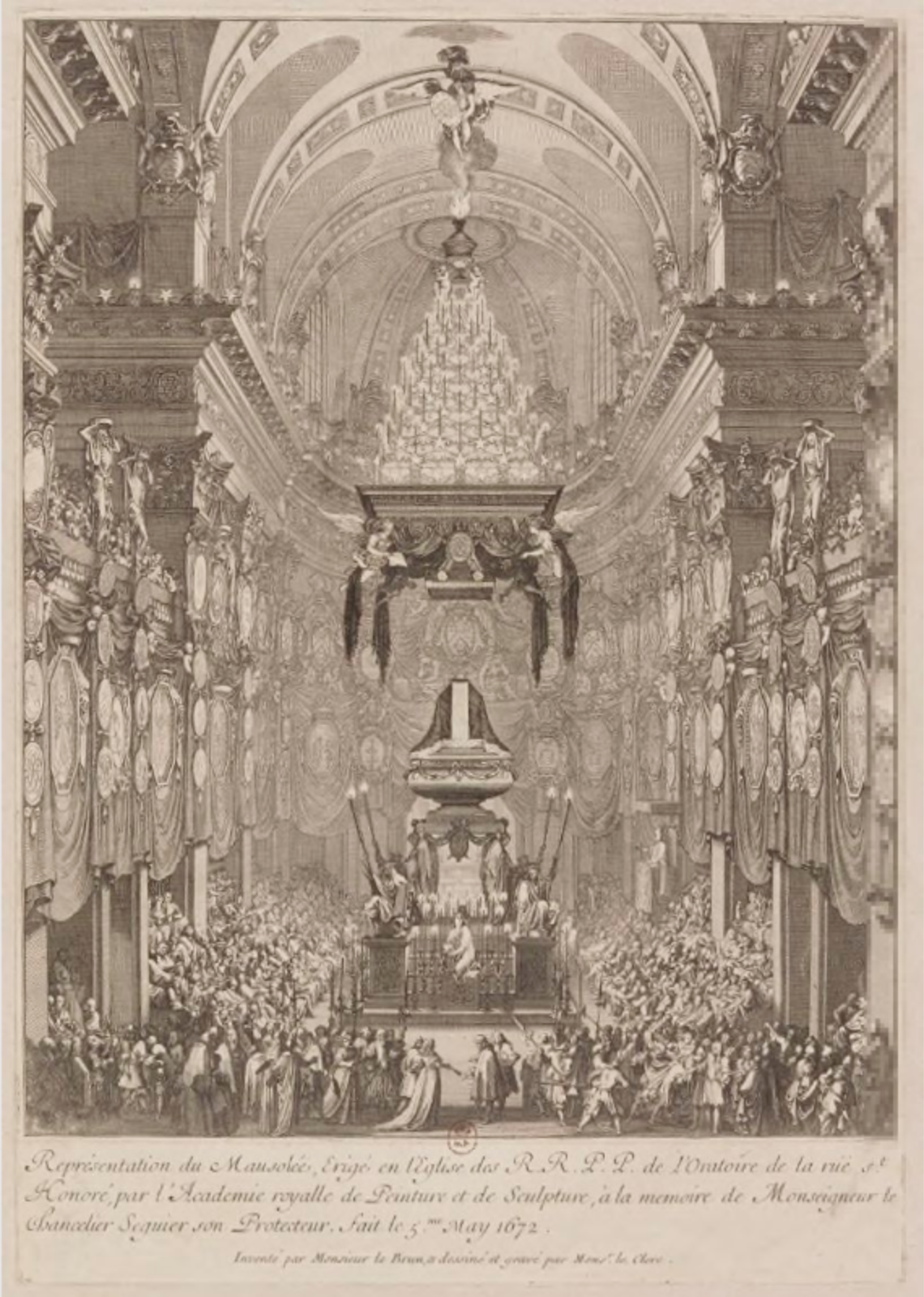 Mausolée du chancelier Séguier Soustitre : Représentation du Mausolée, Érigé en l'Église des R.R.P.P. de l'oratoire de la rüe S.t Honoré, par l'Académie Royalle de Peinture et de Sculpture, à la mémoire de Monseigneur le Chancelier Seguier son Protecteur : [estampe] ([4e état]) / dessiné et gravé par Mons.r Leclerc ; inventé par Monsieur Le Brun eauforte, 1672